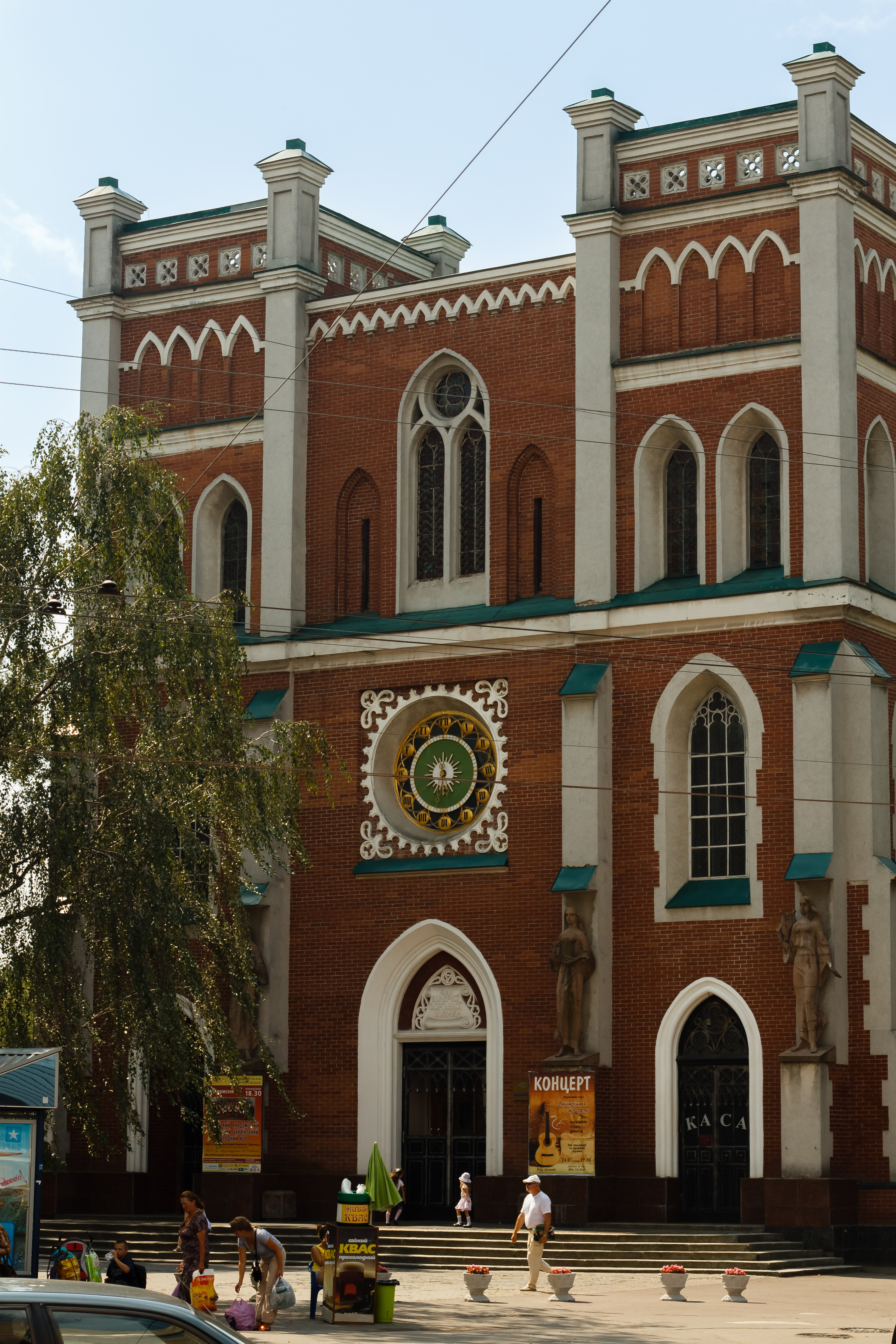 Костел (мур.), Рівне, вул.Соборна, 137